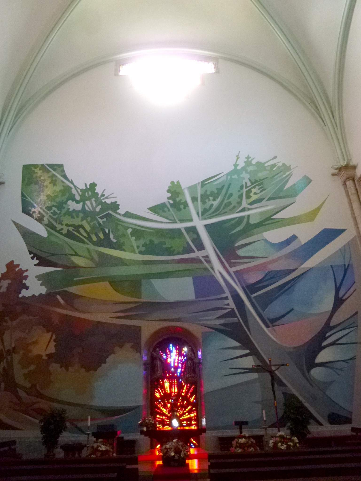 Santuario de Urkiola (Bizkaia)